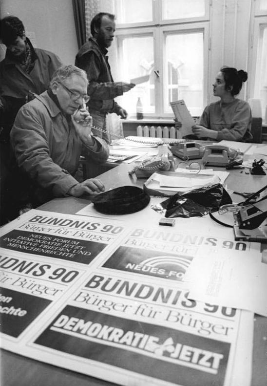 ADN-ZB Uhlemann 28.2.1990 Le Berlin: Im Hause der Demokratie hat das "Bündnis 90", dem das Neue Forum, Demokratie Jetzt und die Initiative Frieden und Menschenrechte angehören, sein Wahlkampfbüro eingerichtet. Die oranisatorischen Vorbereitungen auf den 18. März laufen auf Hochtouren. Am Telefon Jens Reich (NF)."